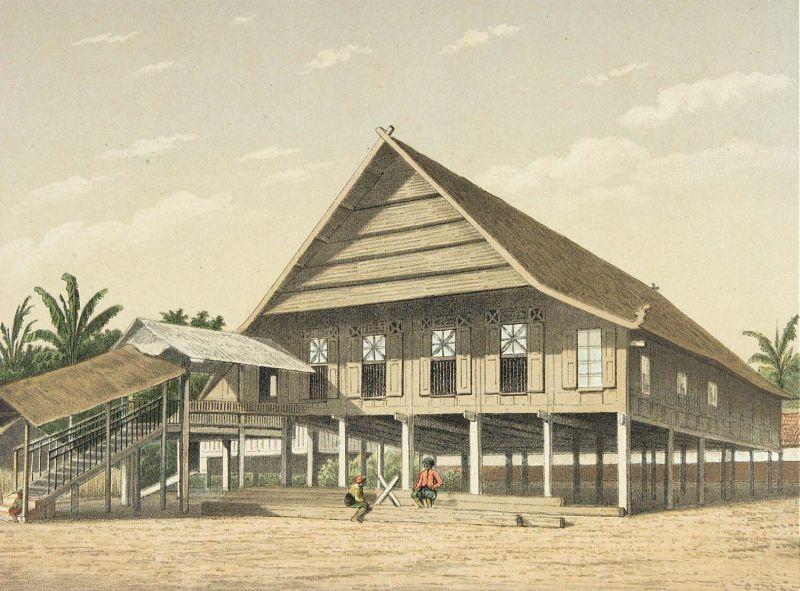 Litho. Litho naar een oorspronkelijke aquarel van J. Rappard.. De woning van de koning van Gowa